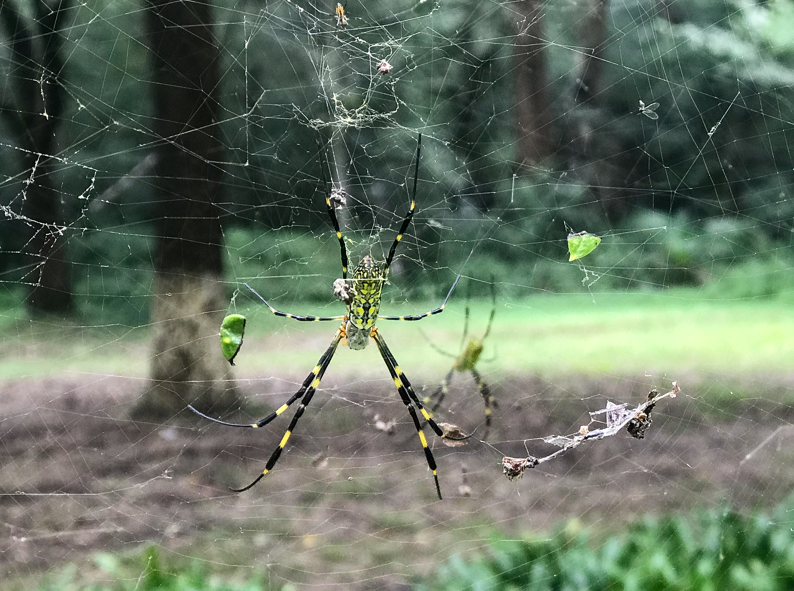 Nephila Clavata (adultes Weibchen), Oktober 2017, Nanjing, Volksrepublik China